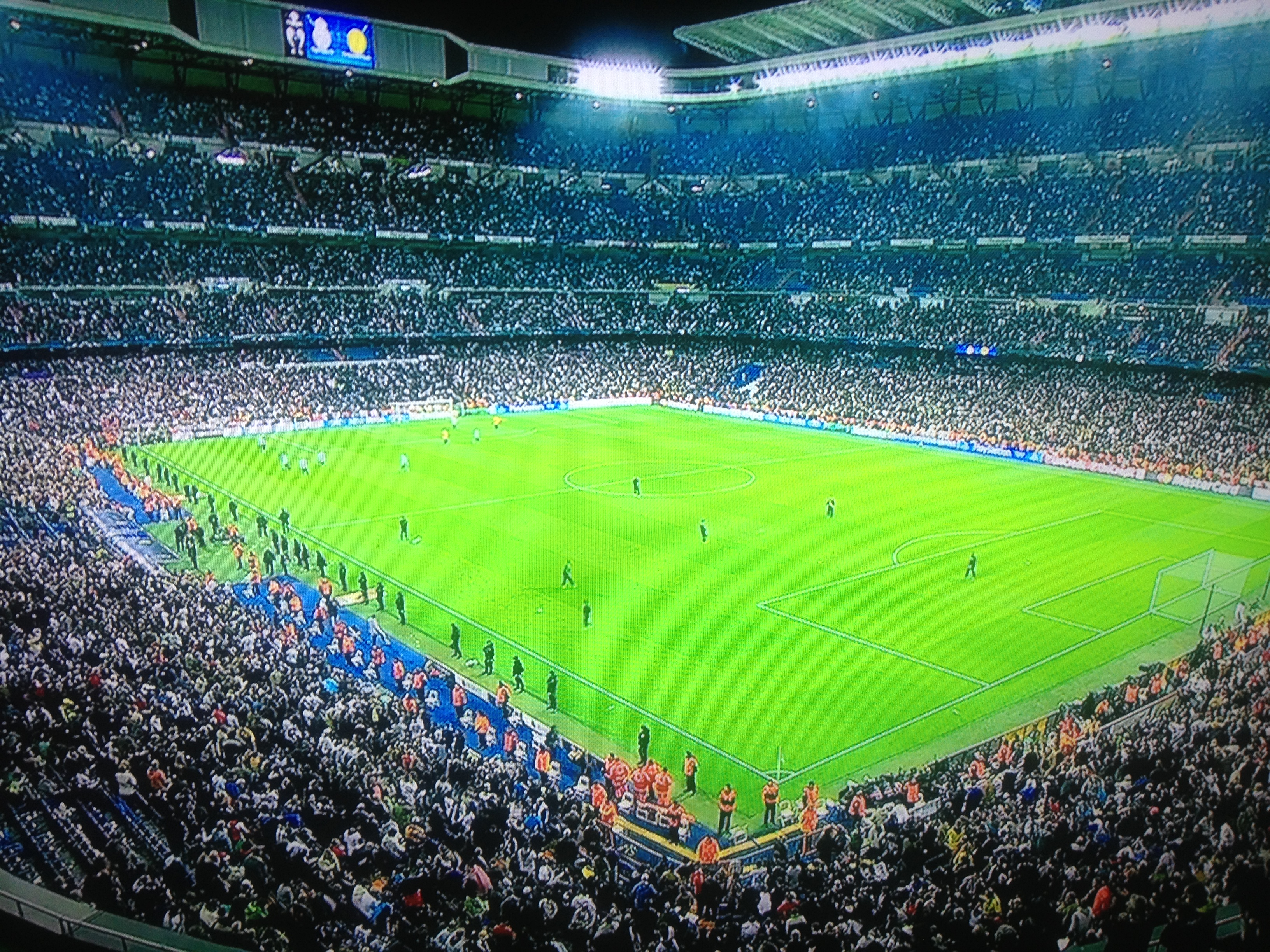 La "casa" del Real Madrid F.C.